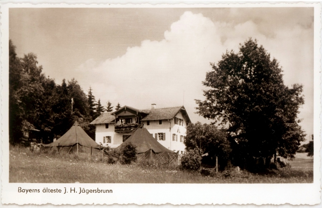 Starnberg, OT Perchting, Jägersbrunn. 1924, in der Blütezeit der Wandervogel-Bewegung, erbaute das Deutsche Jugendherbergswerk auf einer Wiese am Maisinger See Bayerns erste Jugendherberge. Nach einer umfassenden Renovierung wird das Gebäude heute von Peter Maffays Tabaluga-Stiftung als Ferienheim und Begegnungszentrum für traumatisierte Kinder genutzt.